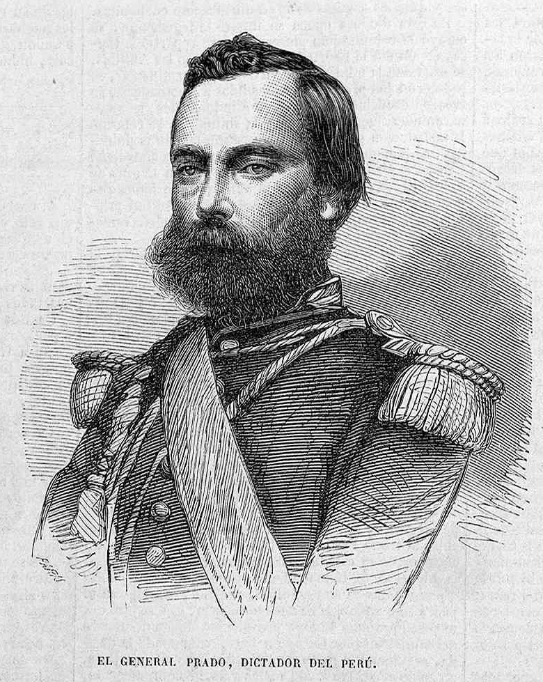 Retrato del general Prado, en la revista española El Museo Universal.